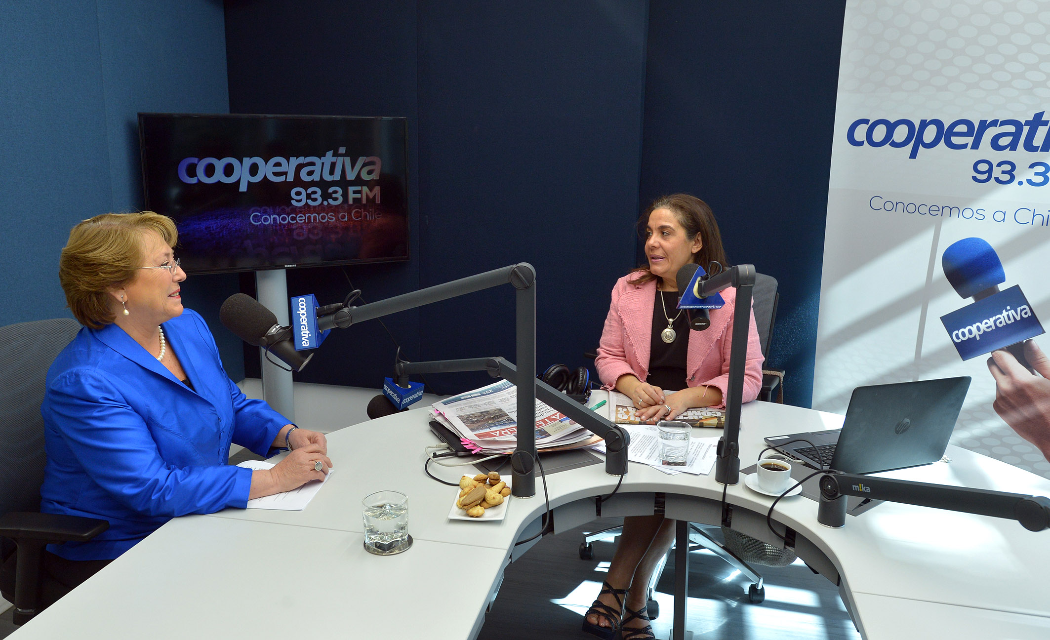 Gobierno de Chile. La Presidenta de la República Michelle Bachelet concedió una entrevista a Cecilia Rovaretti del programa “Una Nueva Mañana” de Radio Cooperativa (2014).